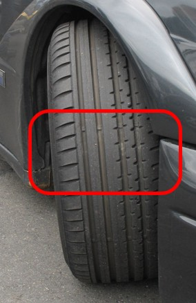 Zom sur les témoins d'usure d'un pneumatique de tourisme